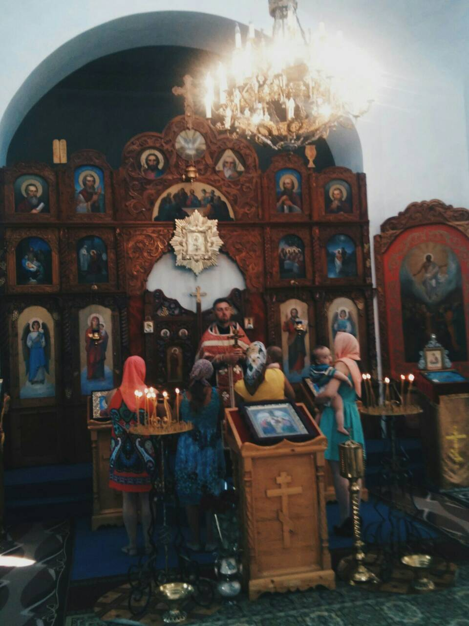 о. Георгій проводить хрещення новонароджених в Храмі Вознесіння Господнього (Новопетрівка)